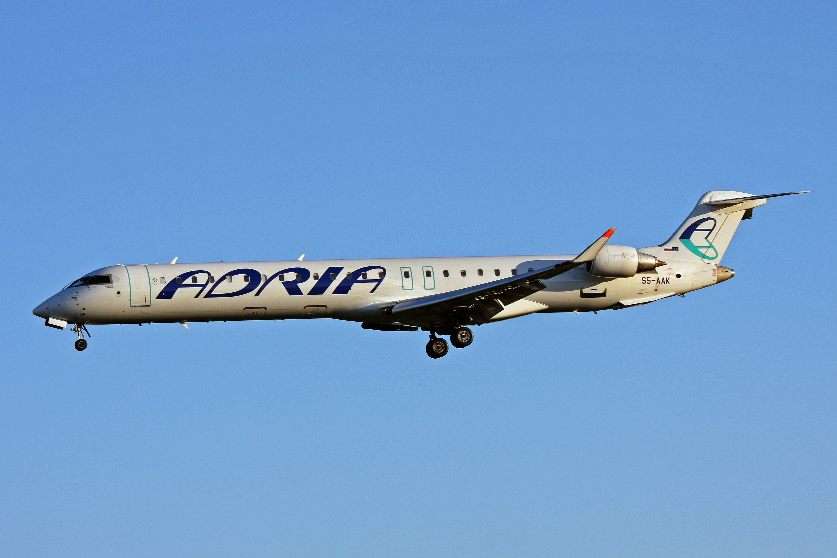 CRJ900 Adria Airways S5-AAK